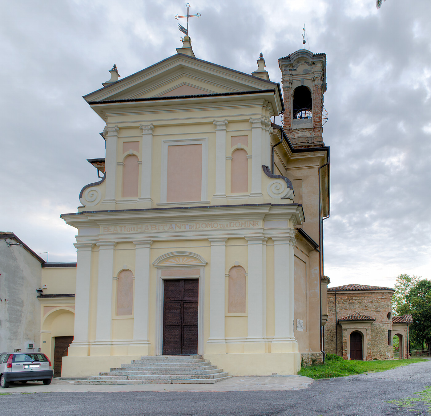 Parrocchia di Castagnara, da Ovest